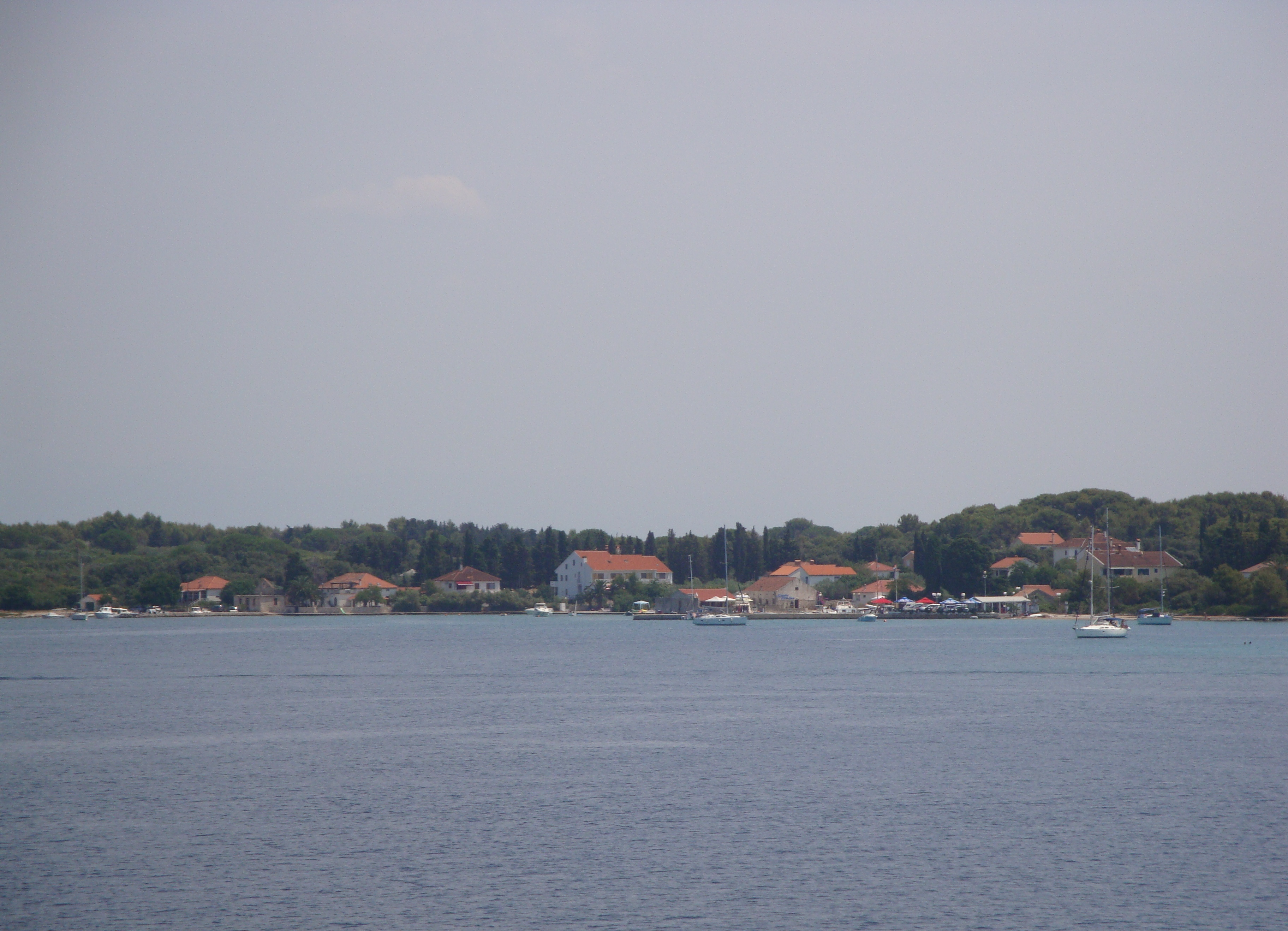 Muline, Ugljan